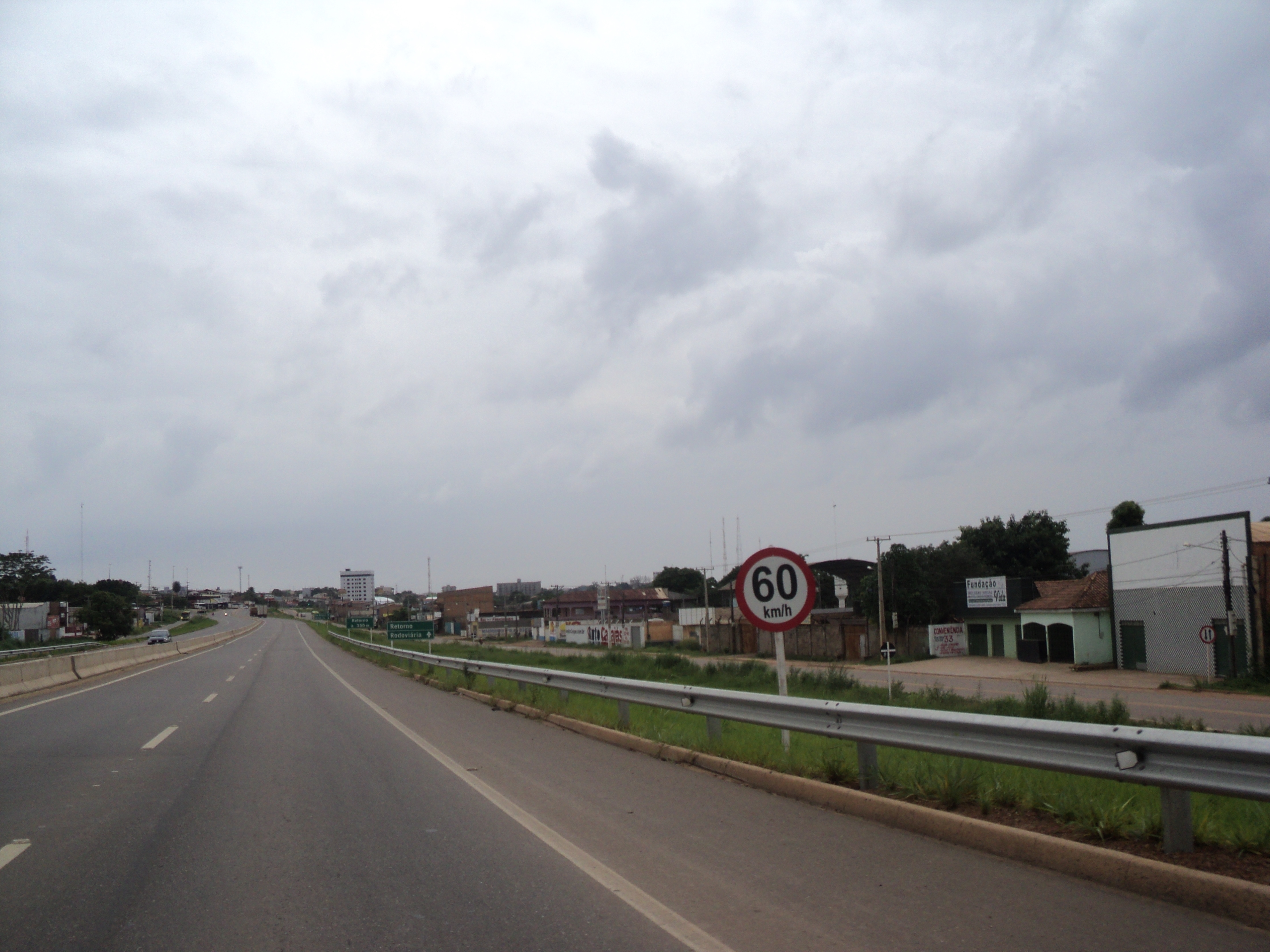 Rodovia Transamazônica, trecho no distrito urbano da Nova Marabá, em Marabá